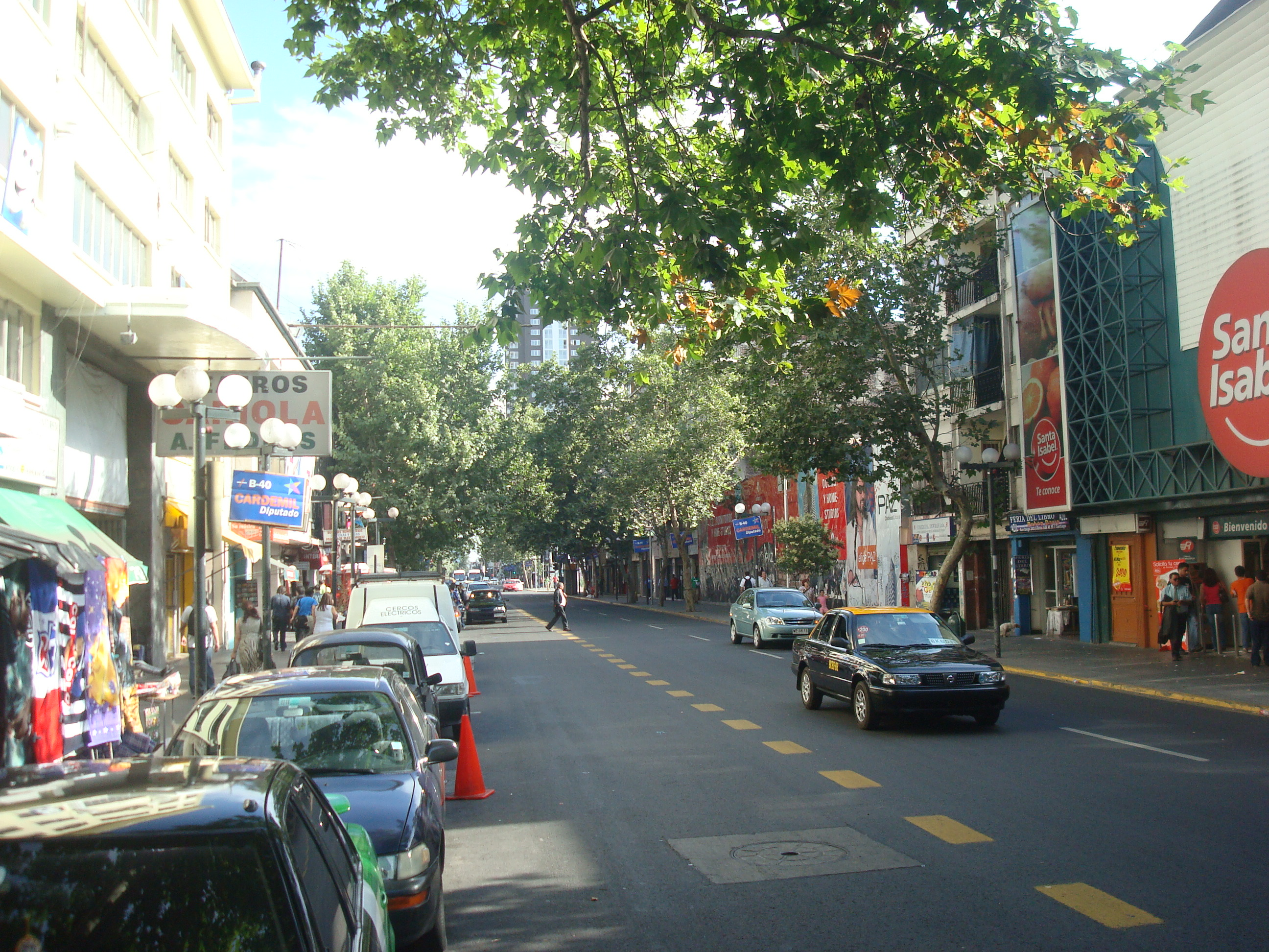 Calle San Diego, Santiago de Chile